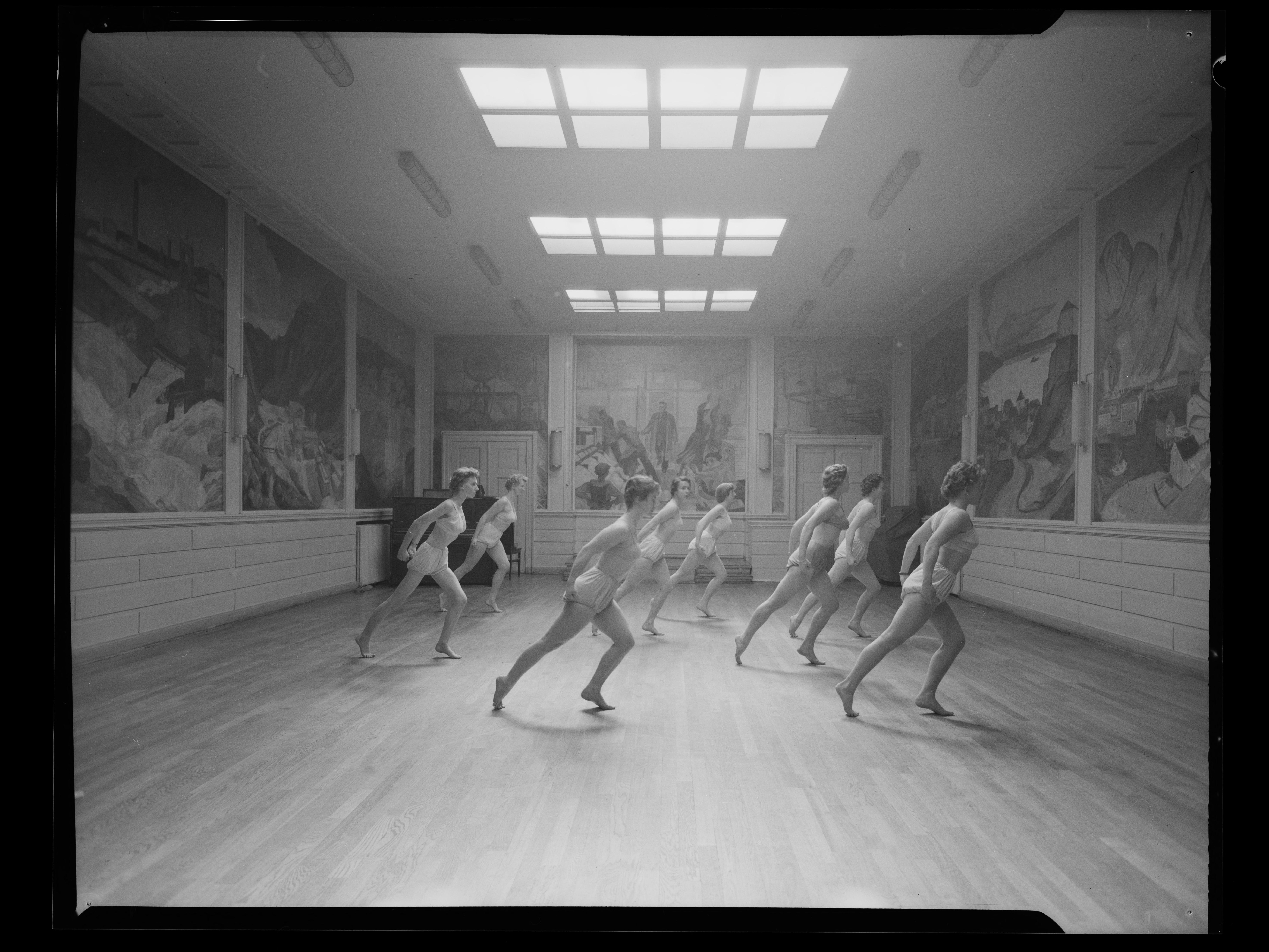 Bildet er hentet fra Nasjonalbibliotekets bildesamling. Anmerkninger til bildet var: Fotograf : T.F.D Oslo, Oslo, Oslo